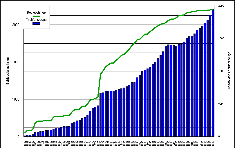 Entwicklung des Lokbestandes und des Streckennetzes der K. Sä. St. E. B.